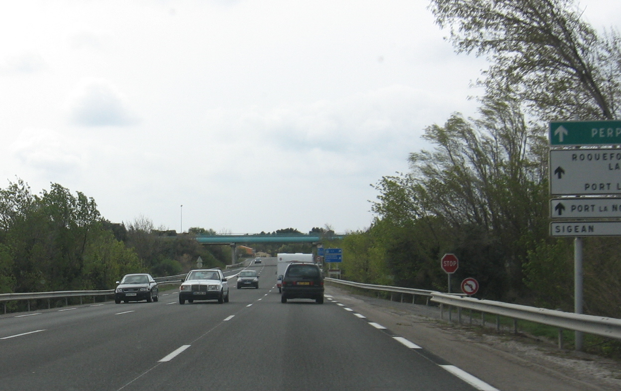 D6009 (former N9) near Sigean, 3 lanes